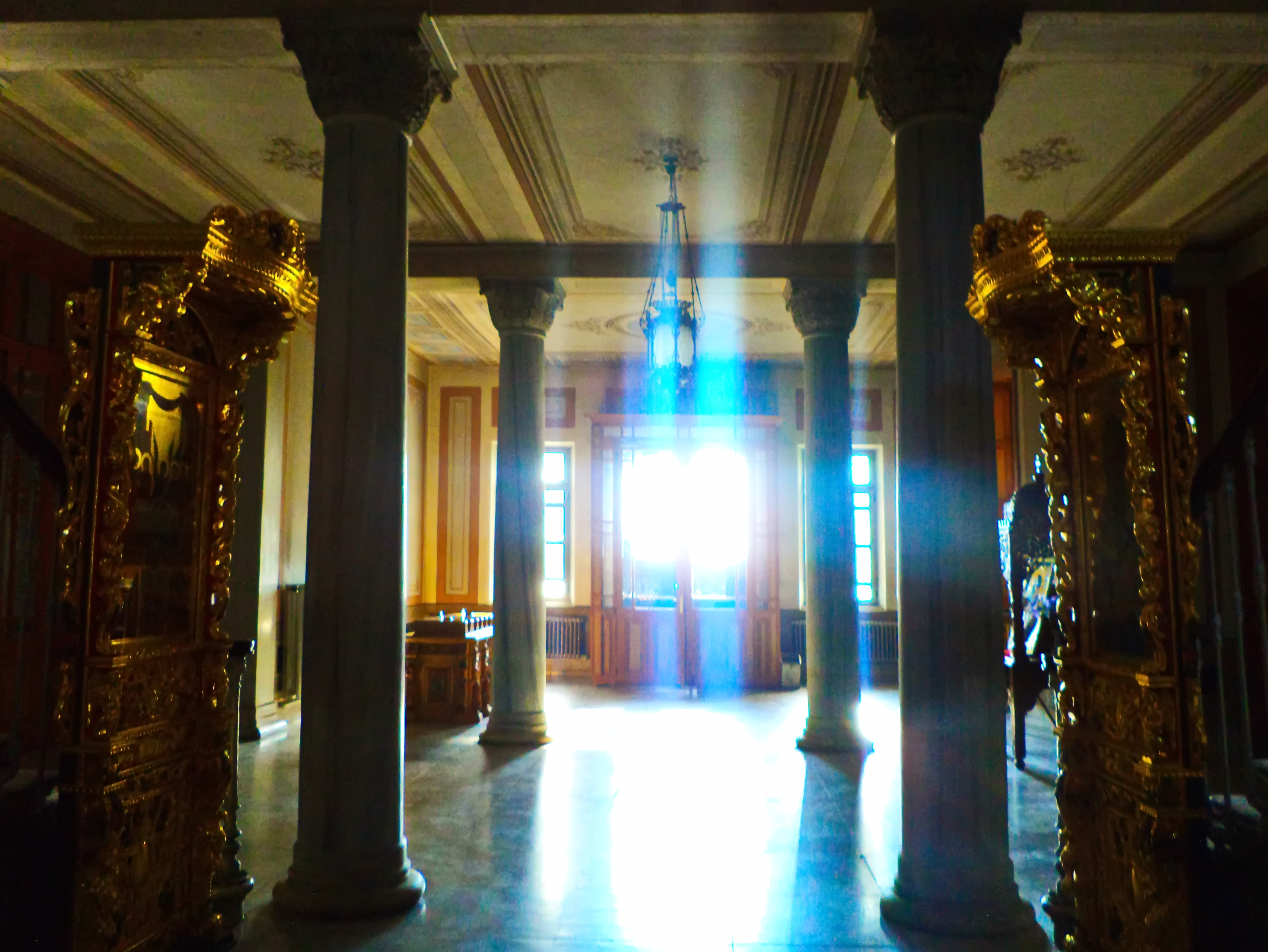 Η Ἱερὰ Θεολογικὴ Σχολὴ τῆς Χάλκης- Eσωτερικος χώρος στο εισόγειο της Θεολογικης Σχολης Χάλκης